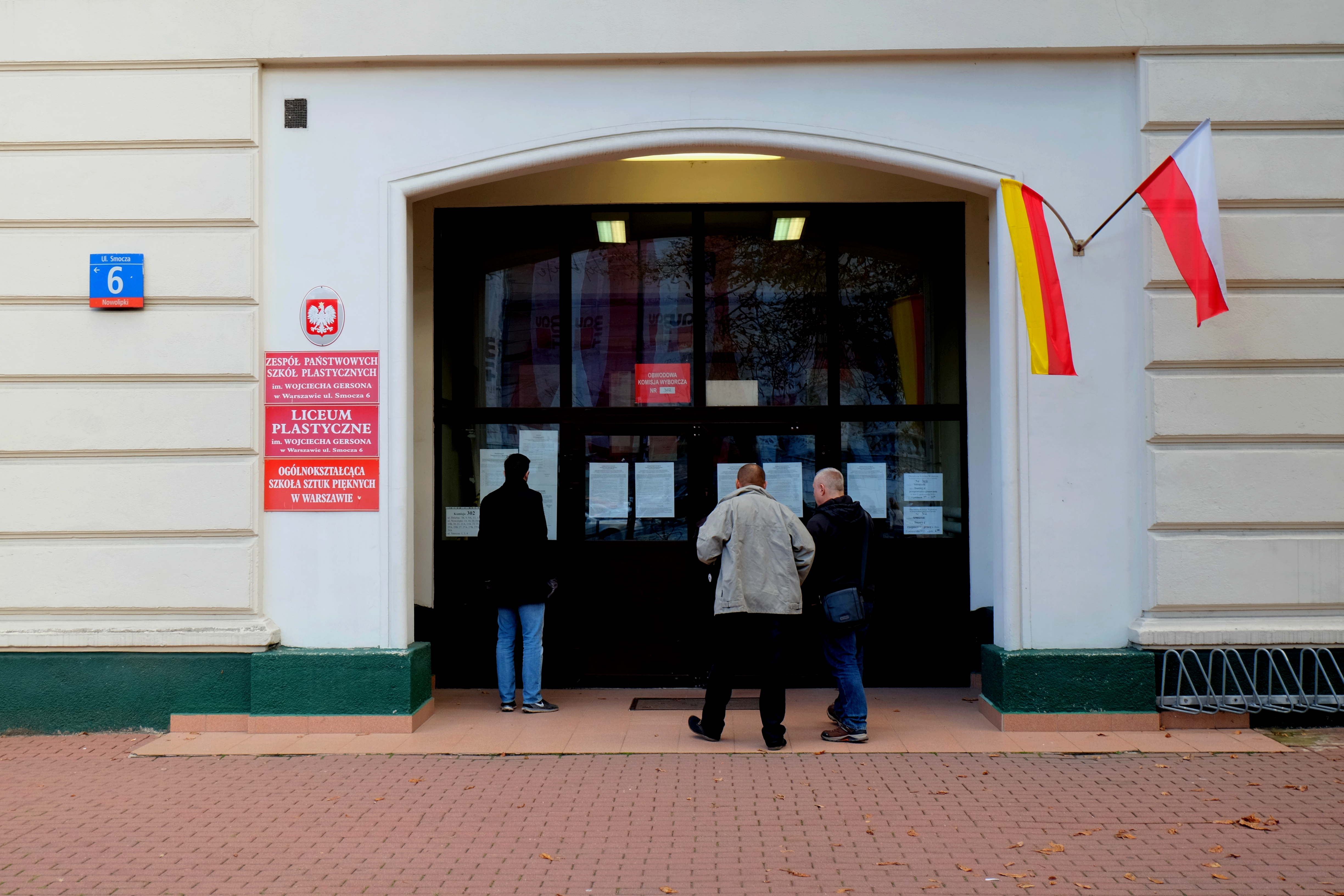 Wybory samorządowe w Polsce w 2018; państwowa obwodowa komisja wyborcza w gmachu Zespołu Państwowych Szkół Plastycznych im. Wojciecha Gersona w Warszawie.